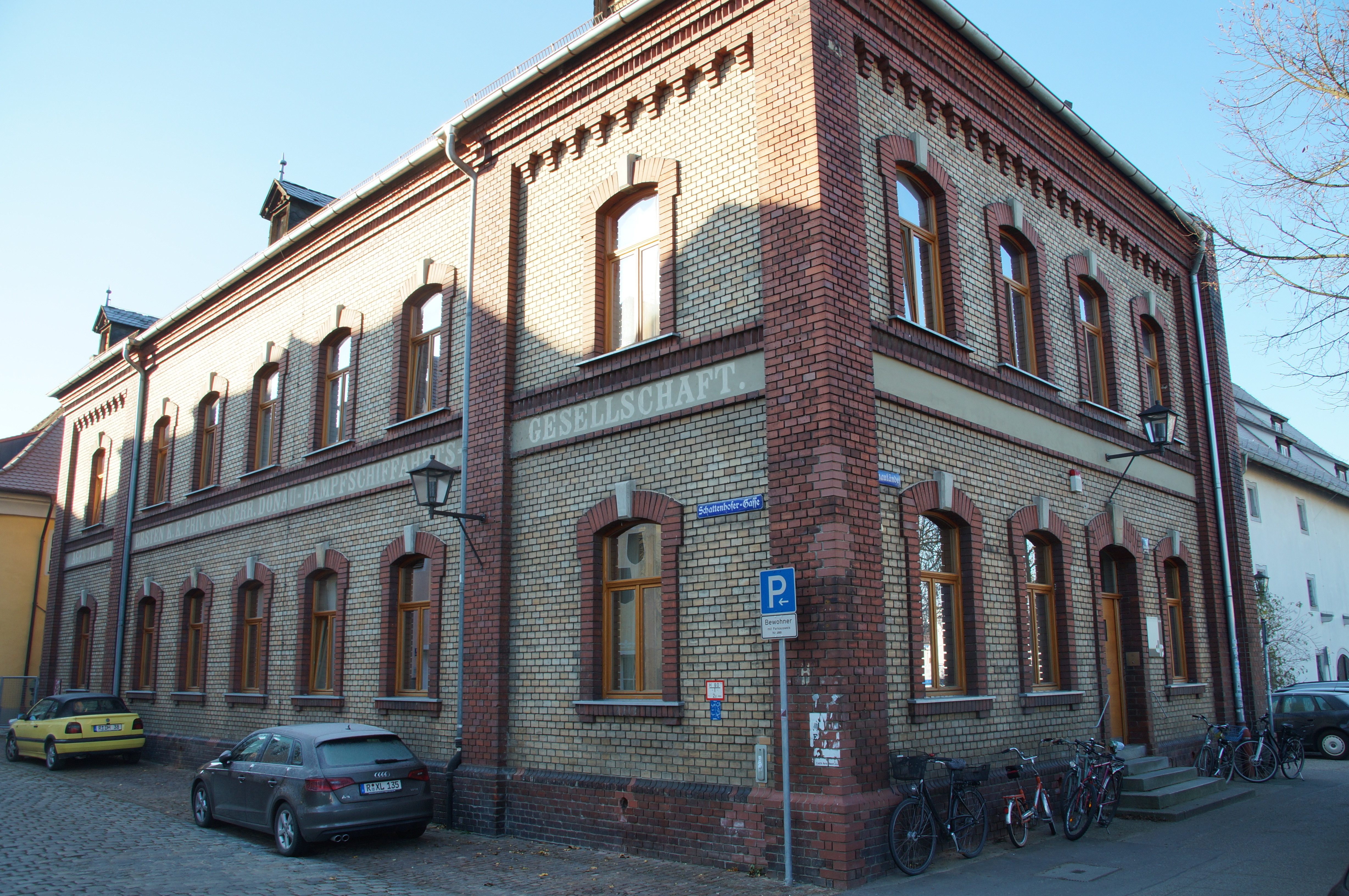 Bürogebäude, ehemalige Agentie der k.u.k. privilegierten österreichischen Donaudampfschifffahrtsgesellschaft, zweifarbig gegliederter, zweigeschossiger Backsteinbau mit Walmdach und Seitenflügelstümpfen mit Frackdächern, historistisch, 1888 This is a photograph of an architectural monument.